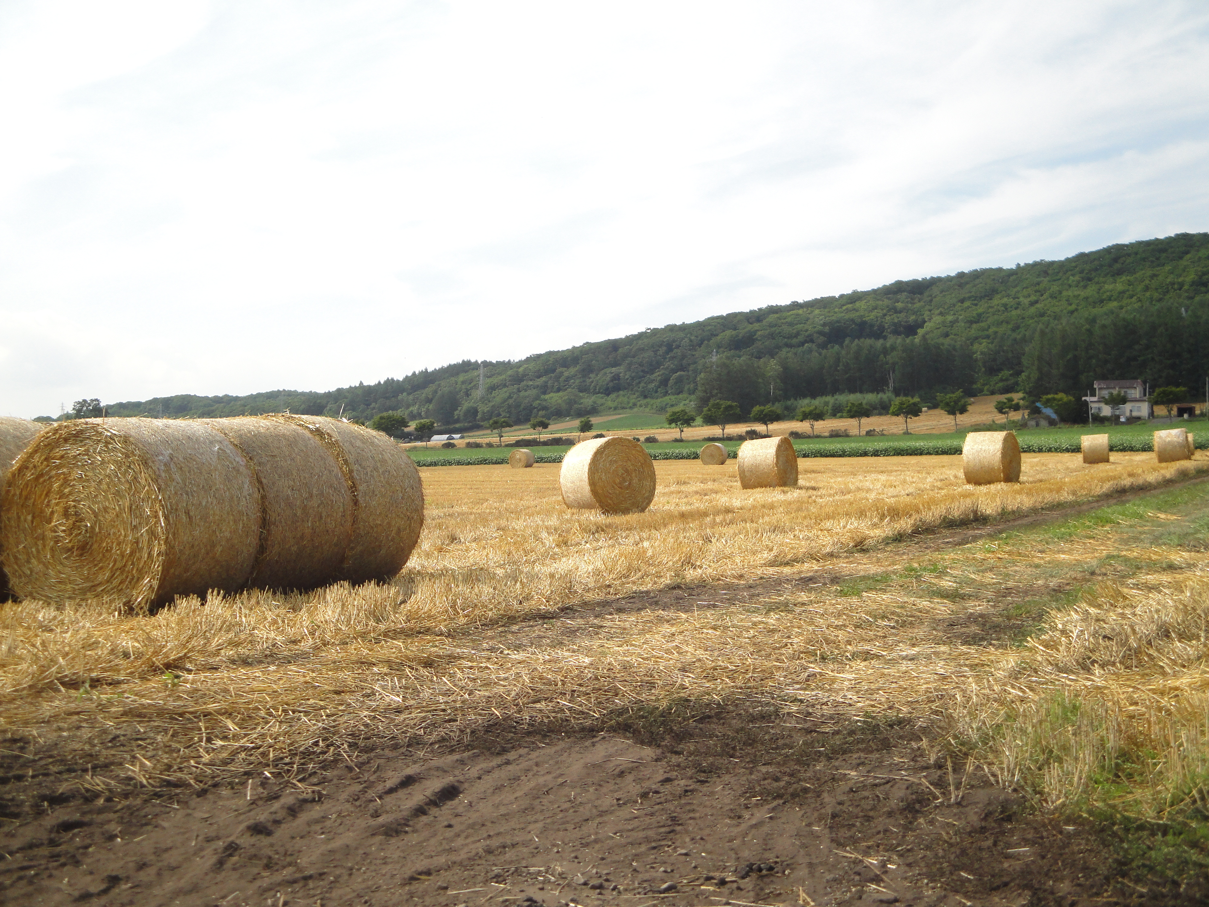 ロールベール（北海道音更町）